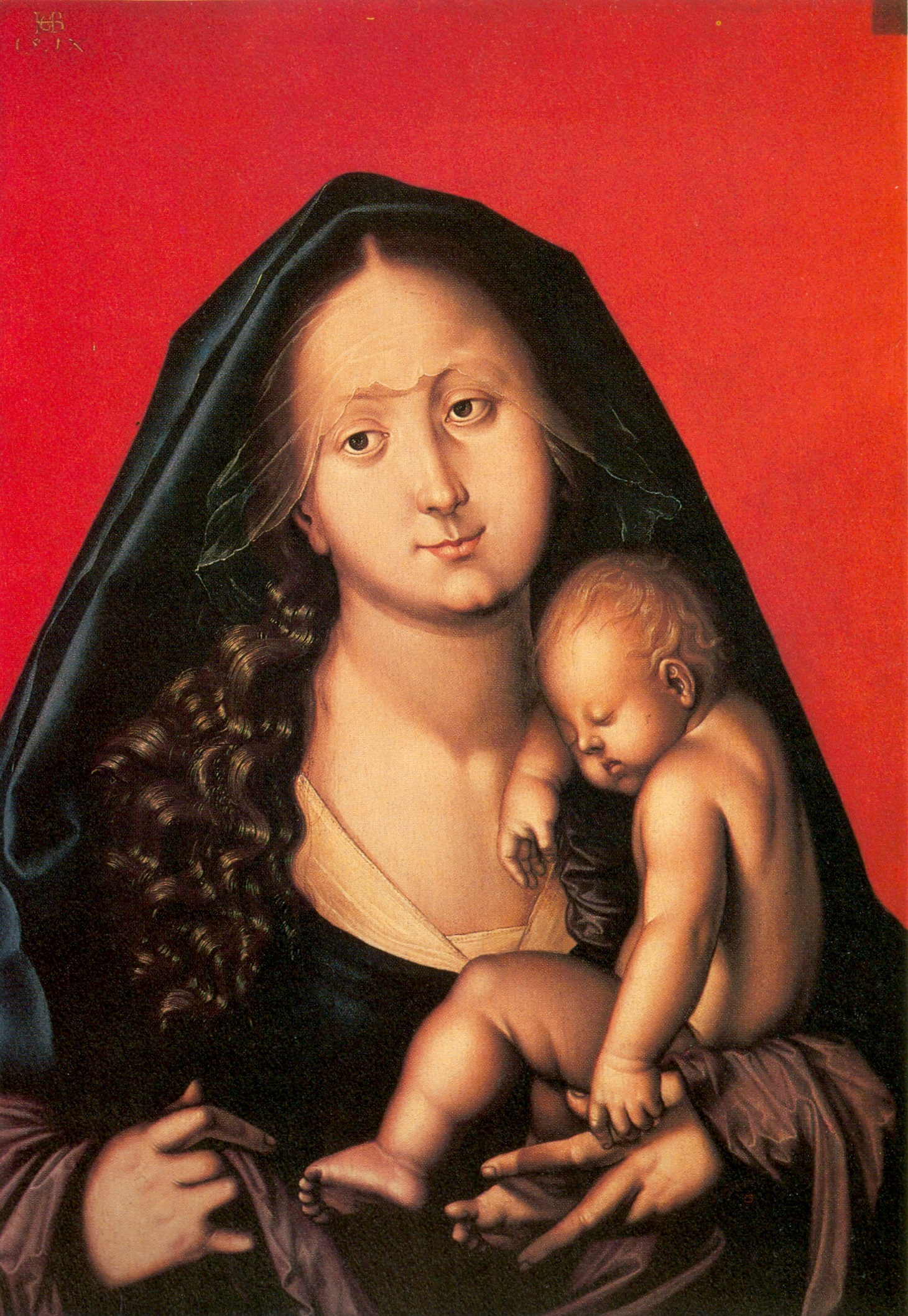 Maria mit dem schlafenden Kinde